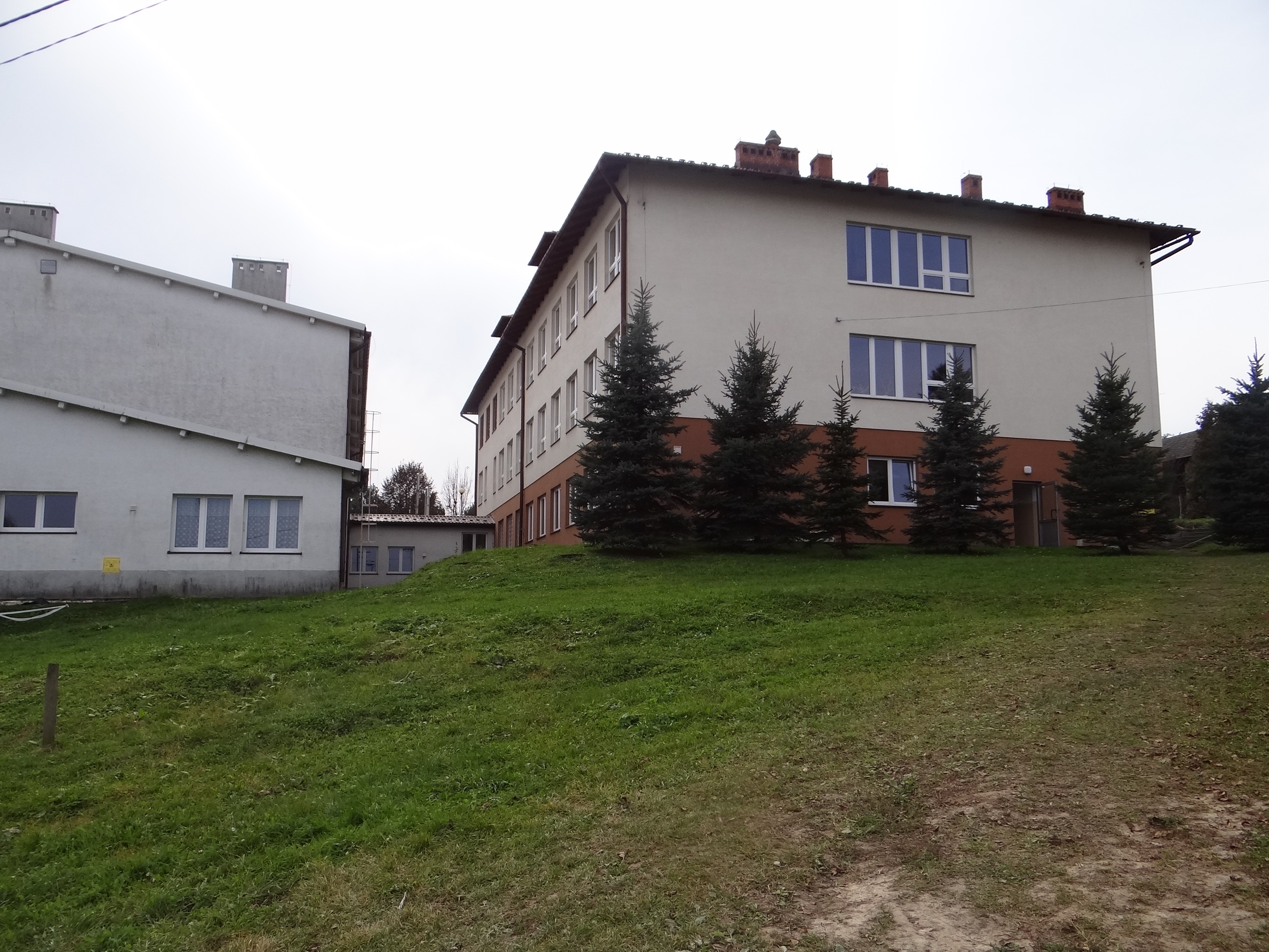 Zespół szkół w Królówce